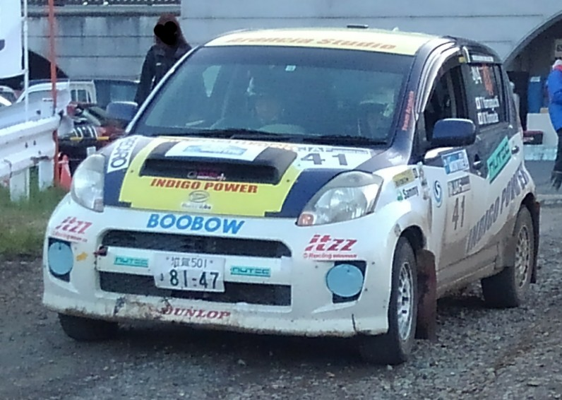 2019年ラリーモントレーに参戦するダイハツ・ブーンX4